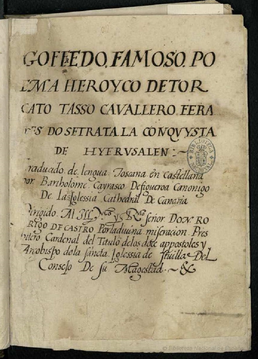 Título: Goffedo, Famoso. Poema heroyco de Torcato Tasso Cavallero Ferares do setrata la conqvista de Hyervsalen : traducido de lengua toscana en castellana por Bartholome Cayrasco de Figueroa, canónigo de la iglessia cathedral de Canaria (Manuscrito) Autor: Tasso, Torquato (1544-1595), traducido por Bartolomé Cairasco de Figueroa. Fecha: Siglo XVI